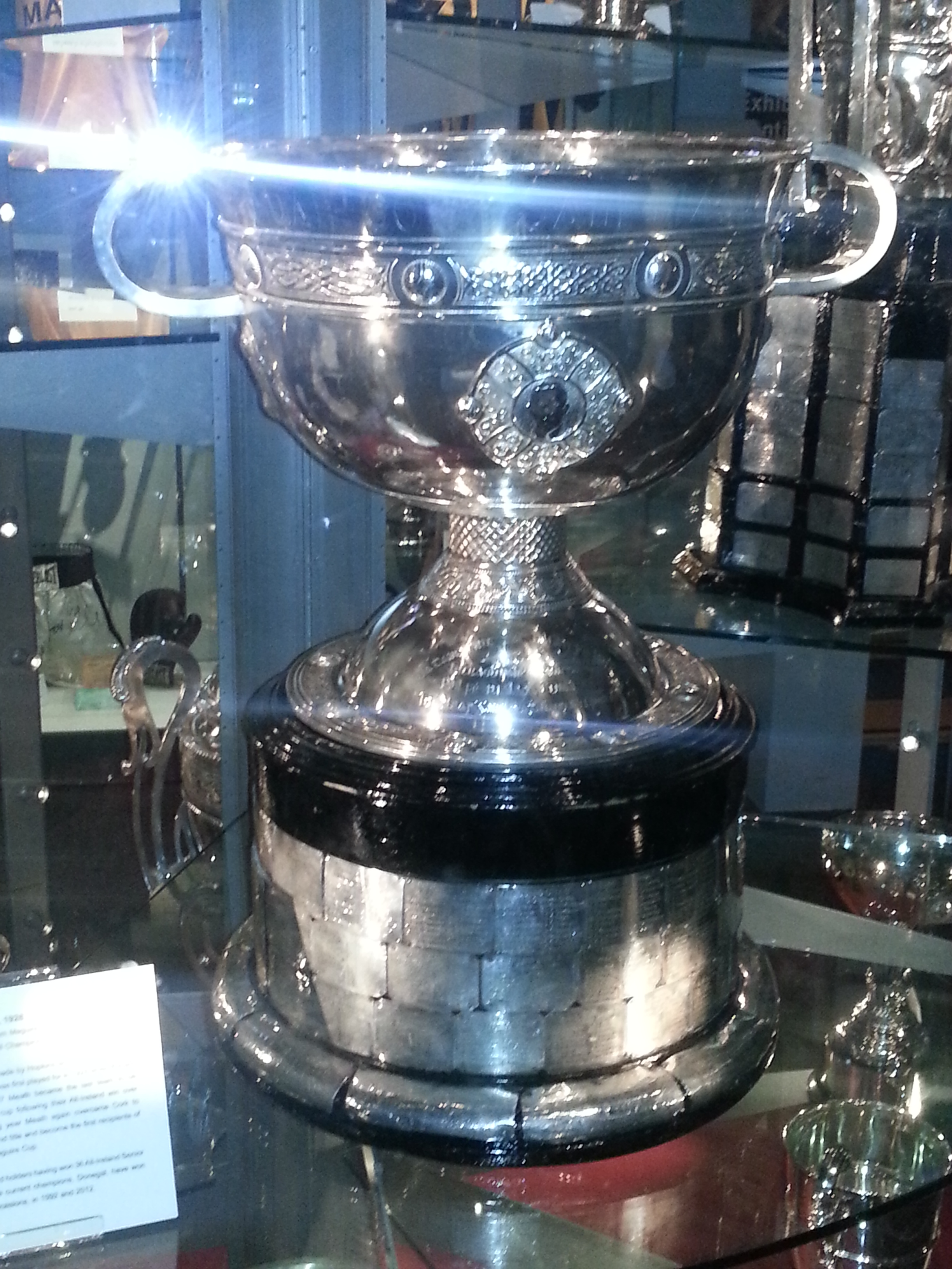 trophée Sam Maguire, remis au vainqueur du championnat Irlandais de football gaélique